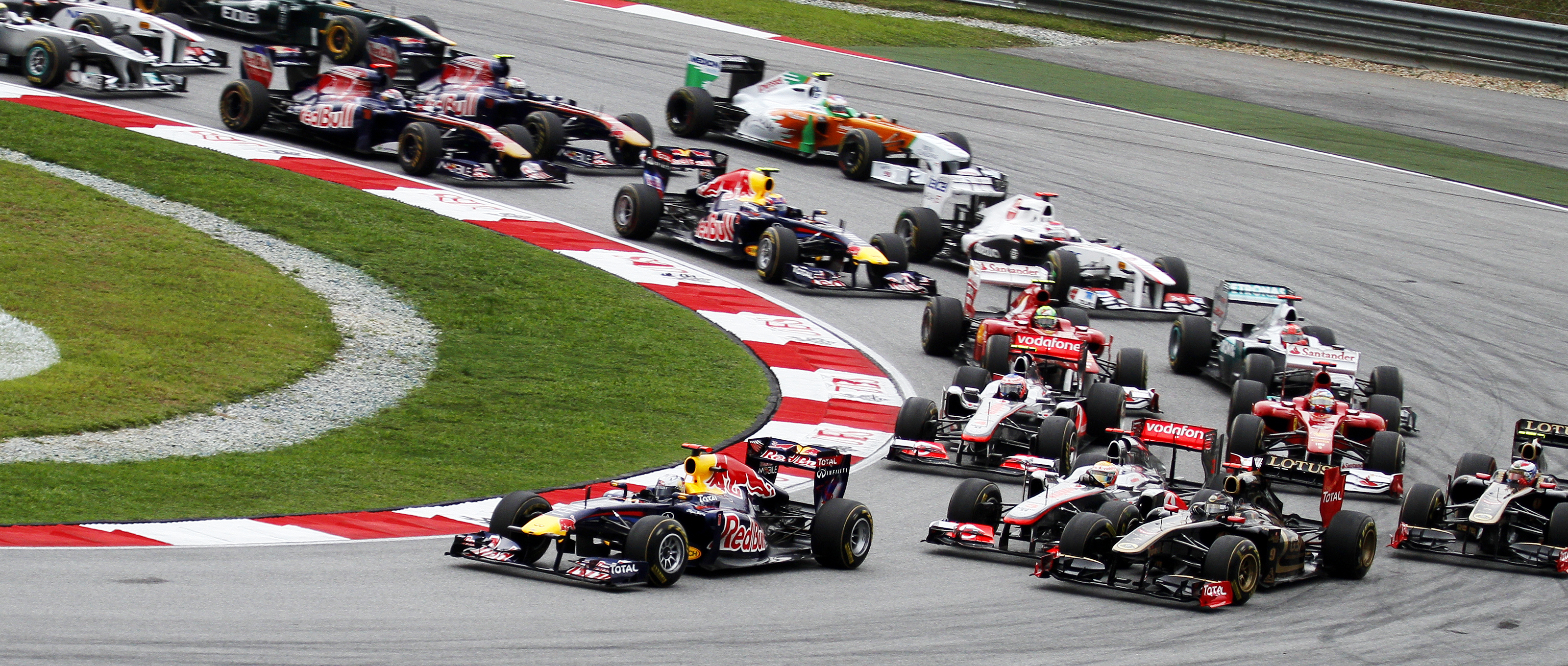 Formula One 2011 Rd.2 Malaysian GP: opening lap